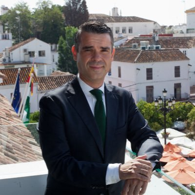 Alcalde de Marbella